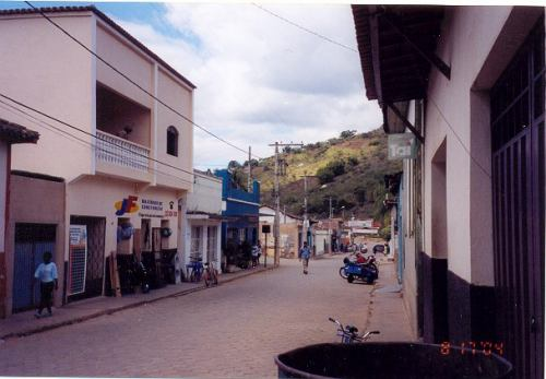 Sao Pedro do Suacui